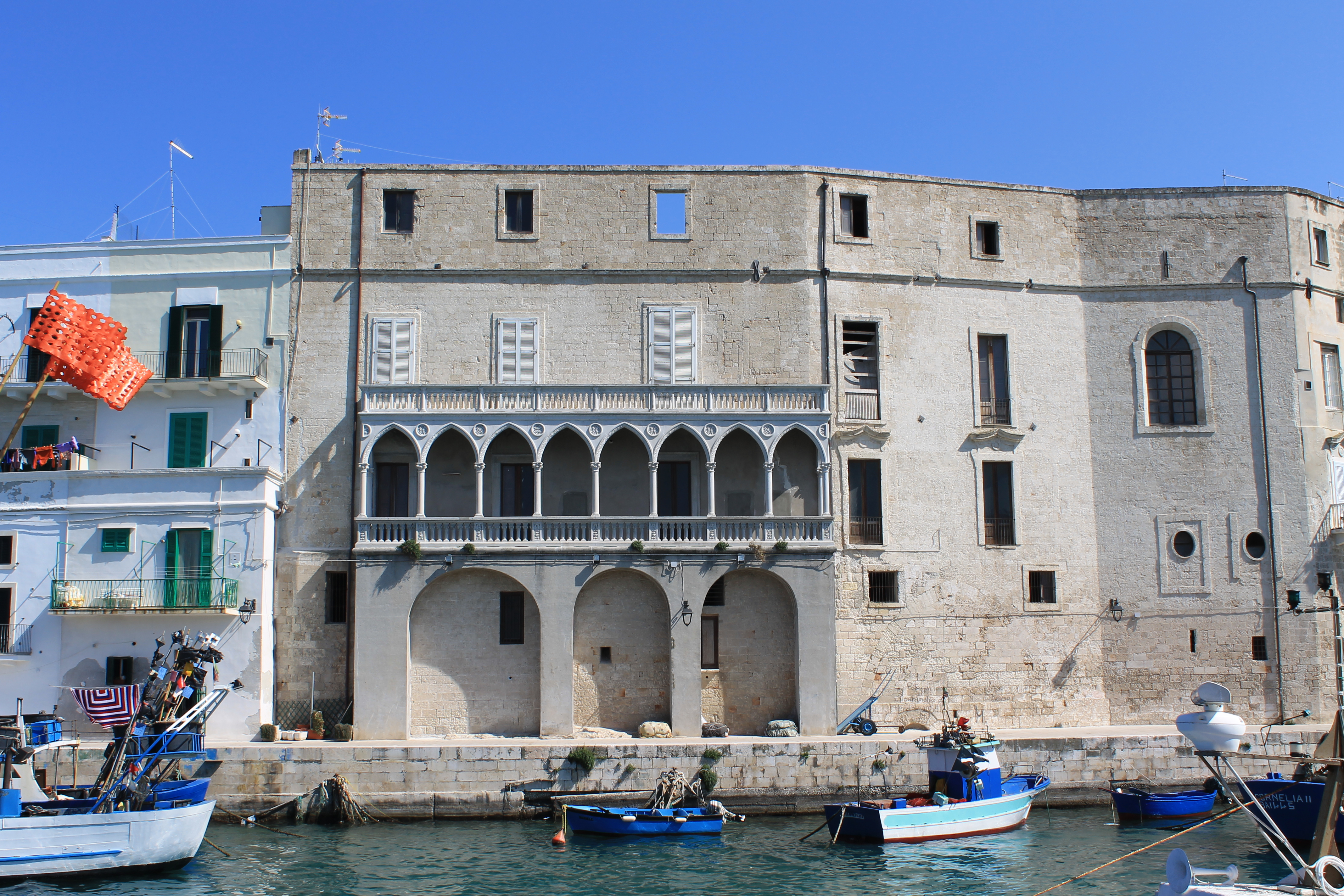 Monopoli, Puglia